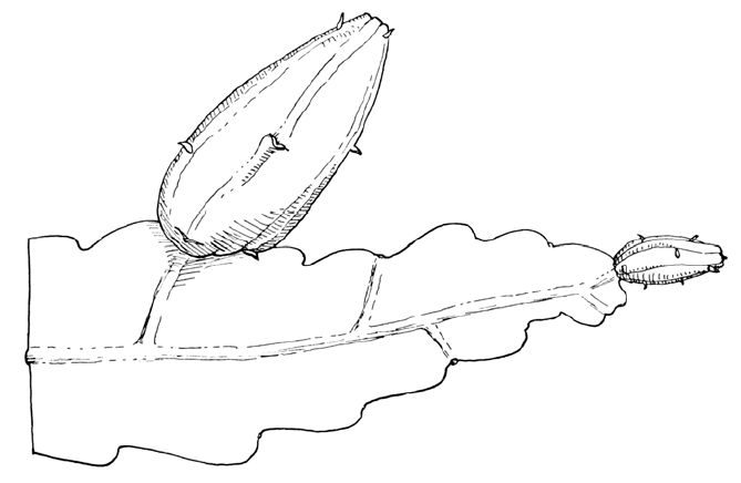 Epiphyllum phyllanthus (Hylocereeae; Cactaceae; Planta) terméses hajtásának rajza Nathaniel Lord Britton és Joseph Nelson Rose "The Cactaceae" c. könyvéből